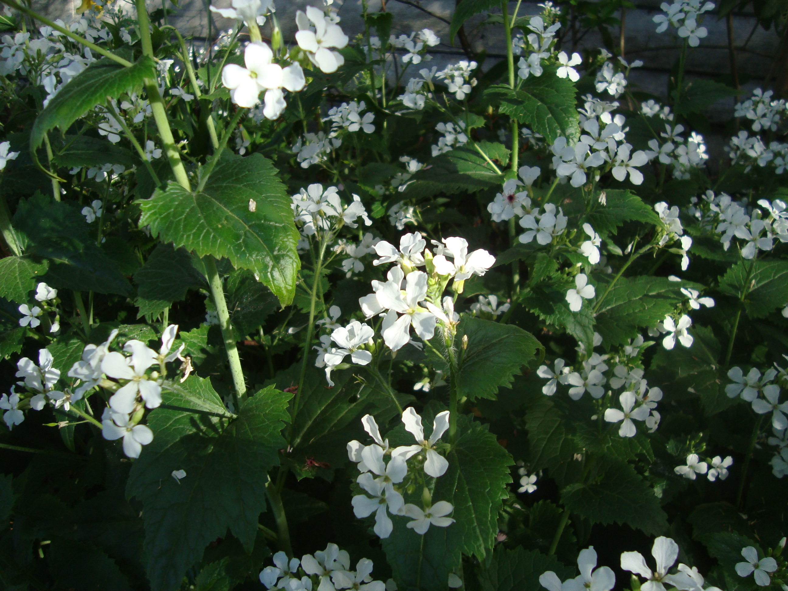 Rara especie de Lunaria annua de color blanco, también se conoce como Flor de la Plata o Moneda del Papa.